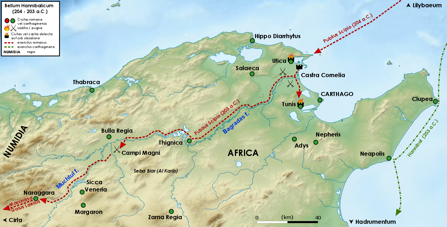 Campagna militare di Scipione Africano nel 204-203 a.C.